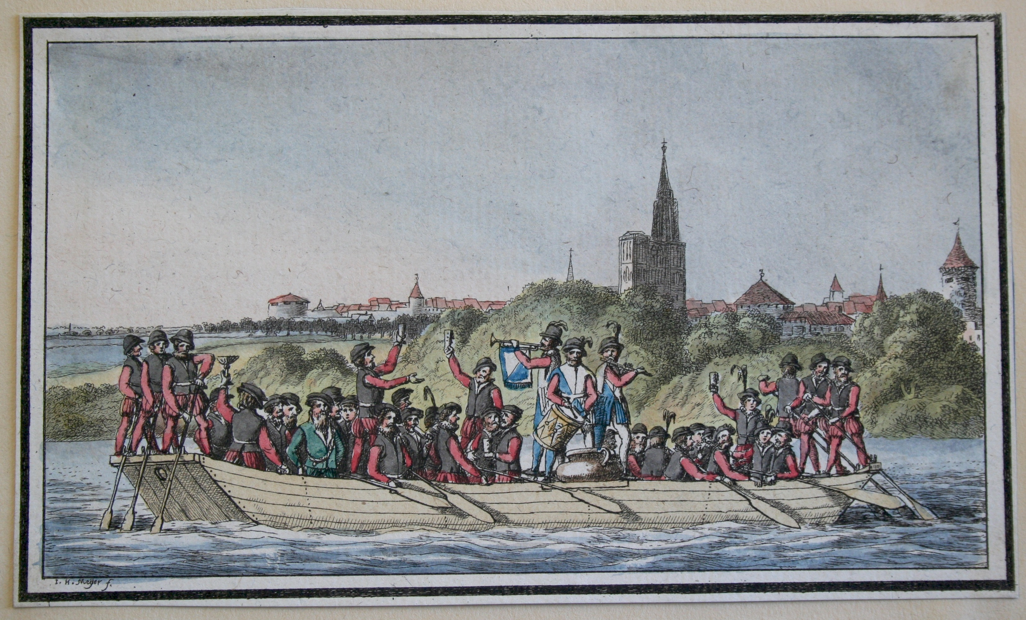 Darstellung der Hirsebreifahrt, kolorierter Stich vom H. Meyer, 1797